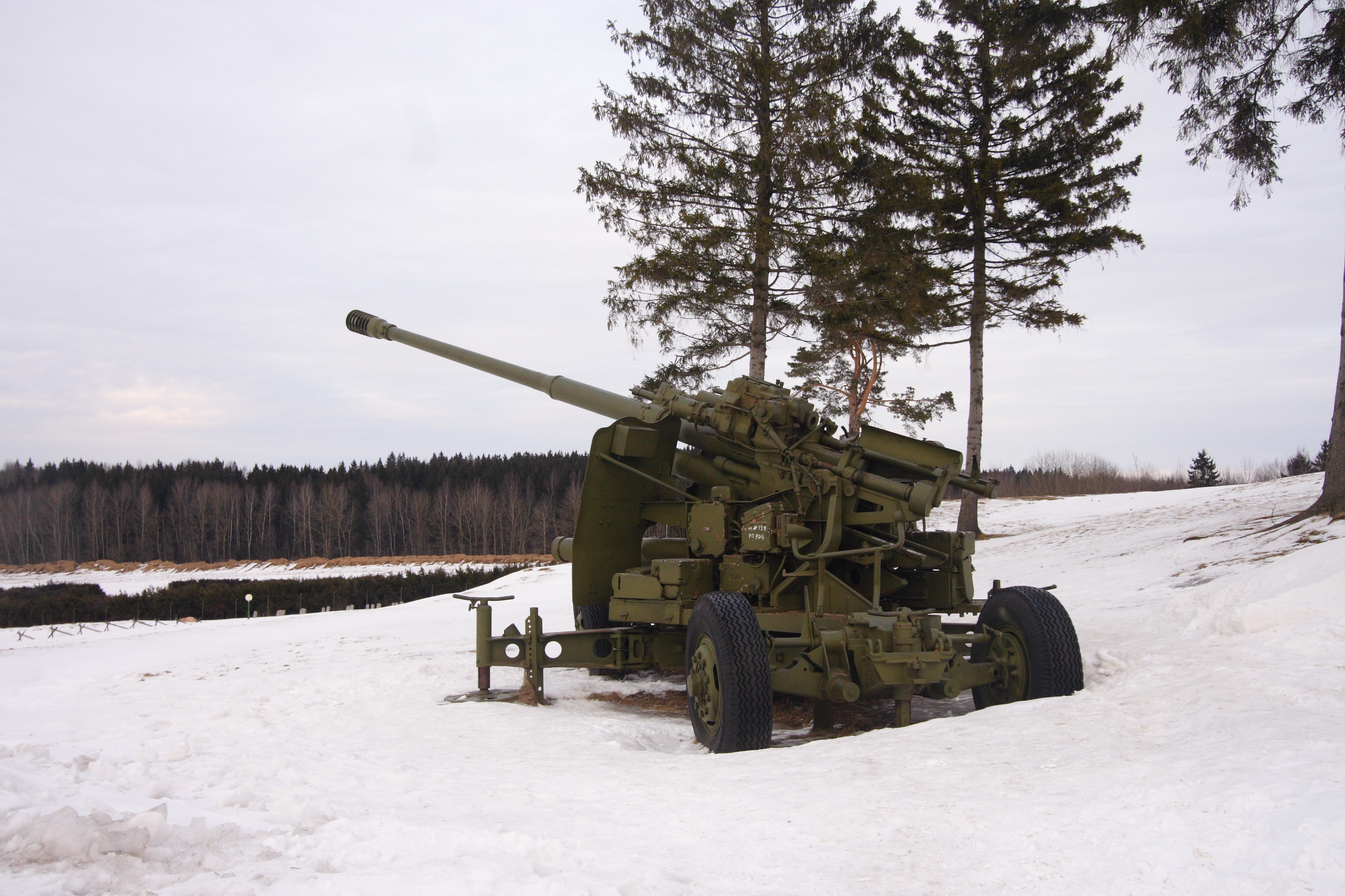 100-mm air defense gun model 1947 (КS-19)